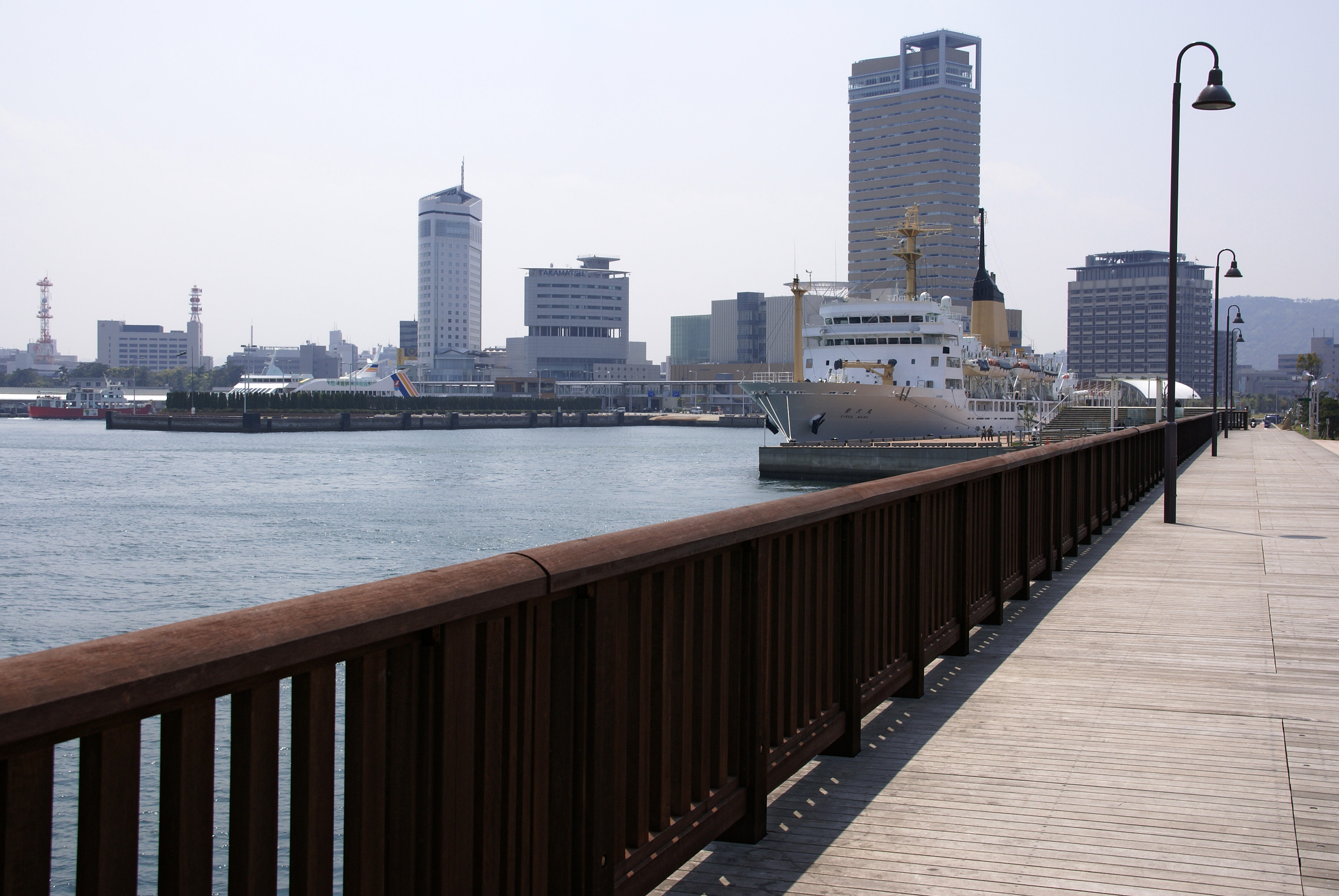 Tamamo Breakwater in Sunport Takamatsu, Kagawa prefecture, Japan